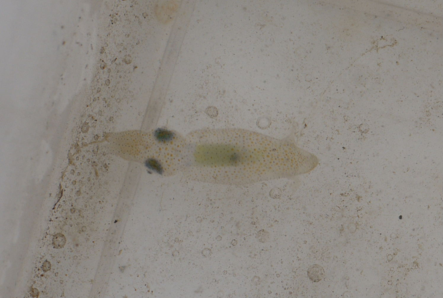 Idiosepius paradoxus：ヒメイカ 2015/05/03 和歌山県田辺市：Tanabe City. Wakayama Pref. Japan